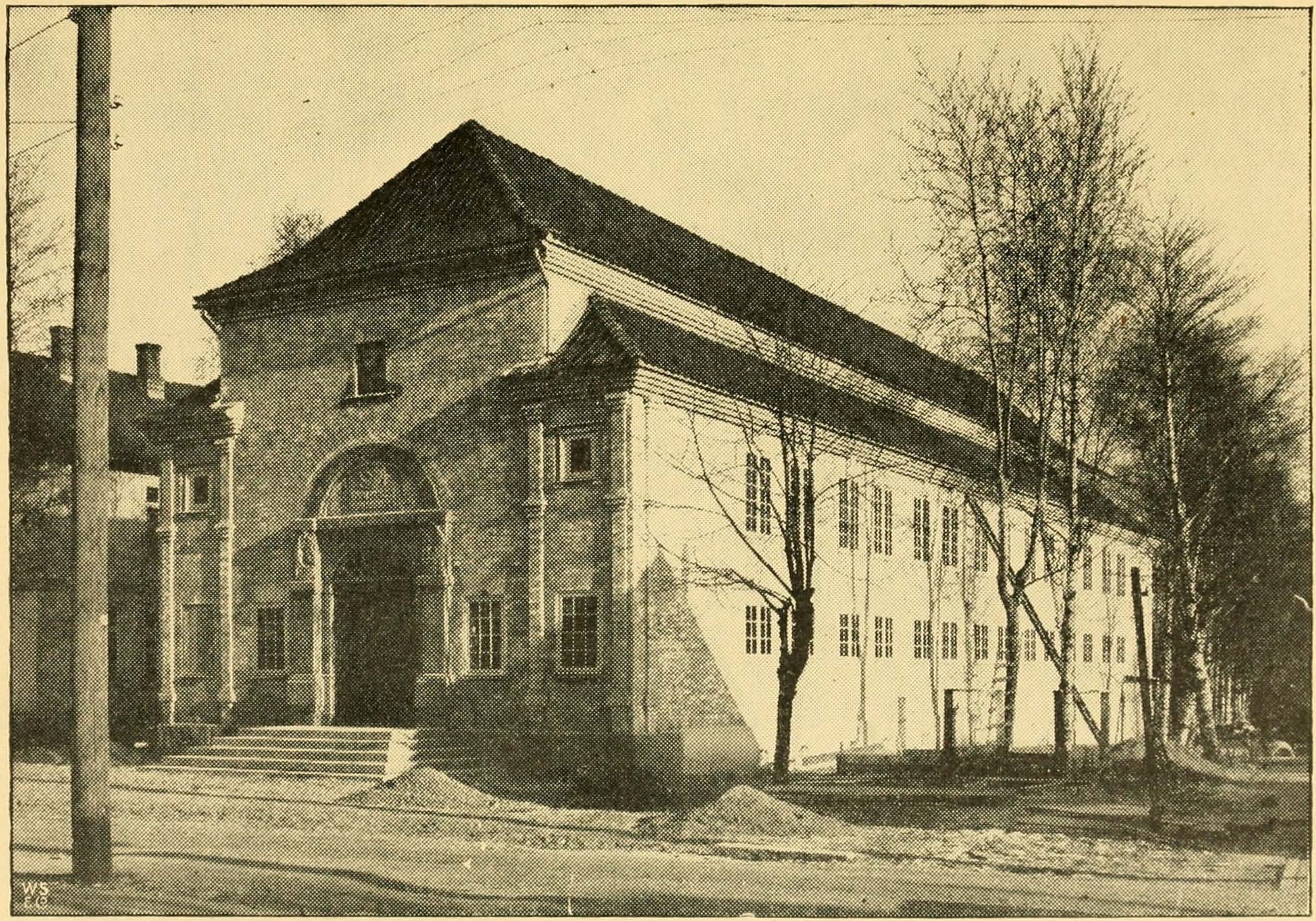 Hvalfangstmuseet - bygget 1917og overlevert til Sandefjords kommune som gave av Lars Christensen